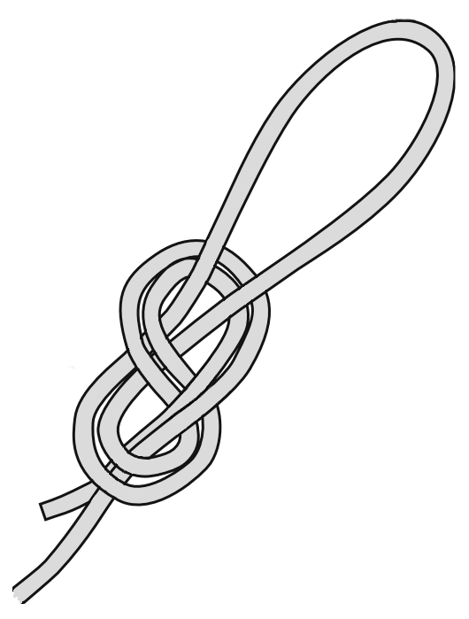 Zeichnung Achtknoten als Schlinge Beschreibung: Zeichnung Achtknoten als Schlinge Quelle: selbstgezeichnet mit Sodipodi und Gimp, 2004-03-22 Fotograf oder Zeichner: Hella Lizenzstatus: GNU FDL 14:12, 22. Mär 2004 Hella 530 x 699 (37.892 Byte) (Zeichnung Achtknoten als Schlinge)